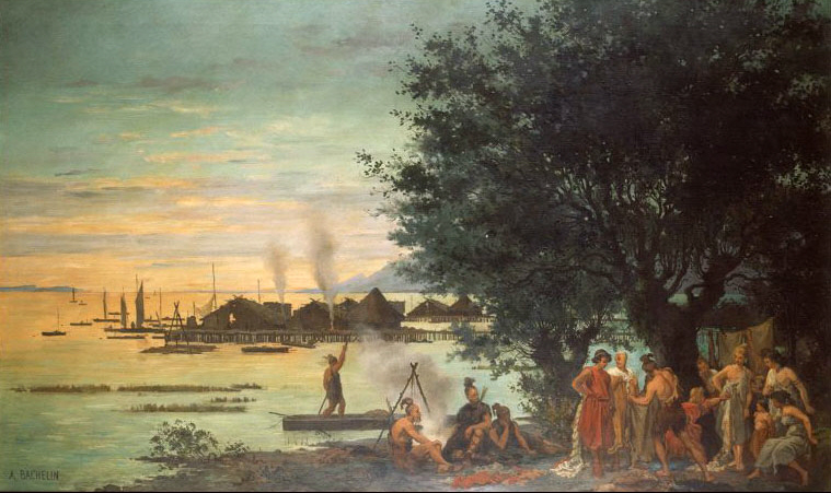 Tauschhandel zwischen Phöniziern und Pfahlbauern (mit Idealbild einer Pfahlbausiedlung). Öl auf Leinwand. Datiert 1867. 148 cm x 249 cm Schweizerisches Landesmuseum, Zürich